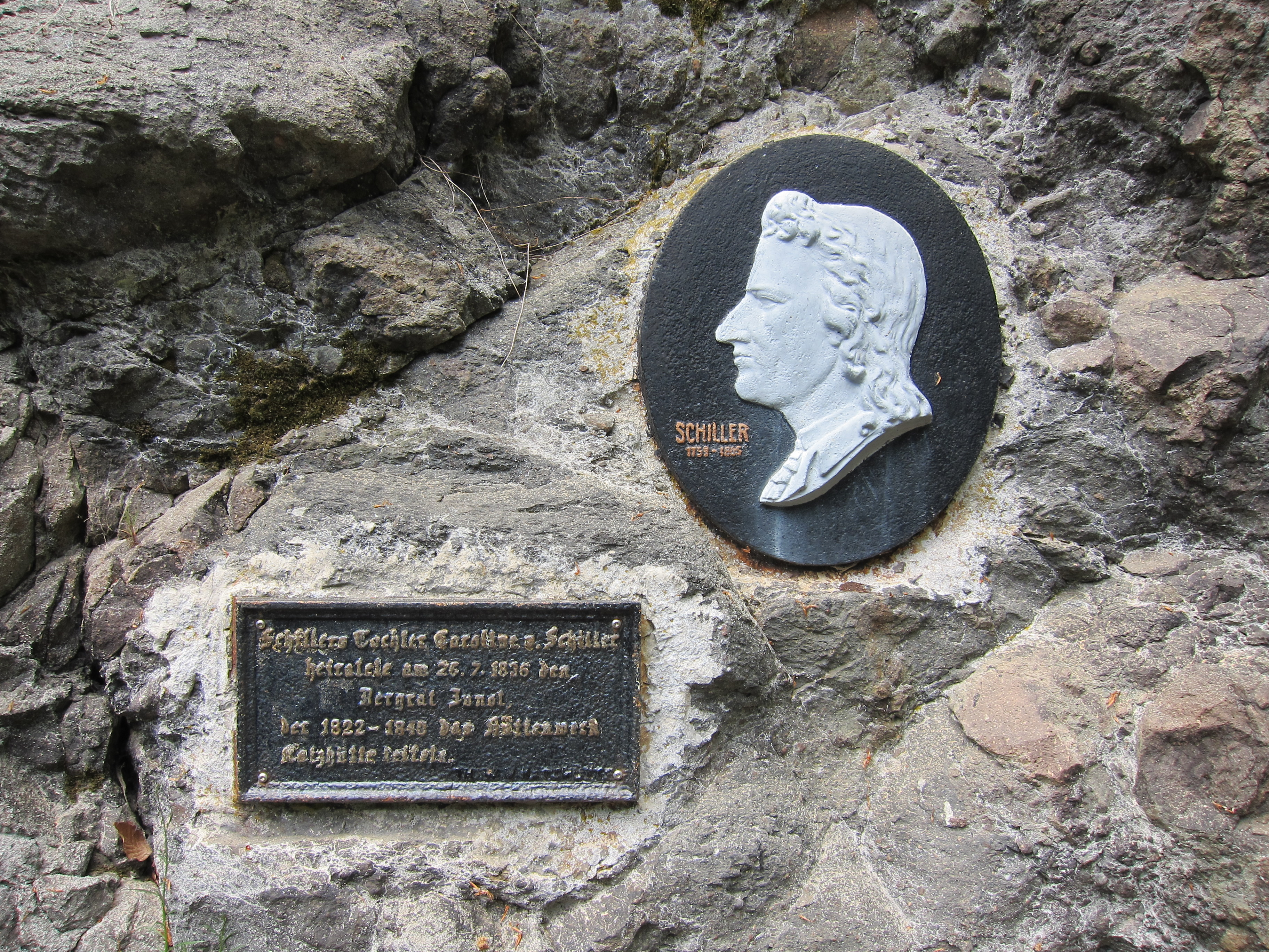 Gedenktafel und Schillerplakette zur Erinnerung an den Bergrat Franz Karl Immanuel Junot und die Tochter Friedrich von Schillers Caroline Henriette Luise; Die Jahreszahlen entsprechen dem Kenntnisstand des Jahres 1930.